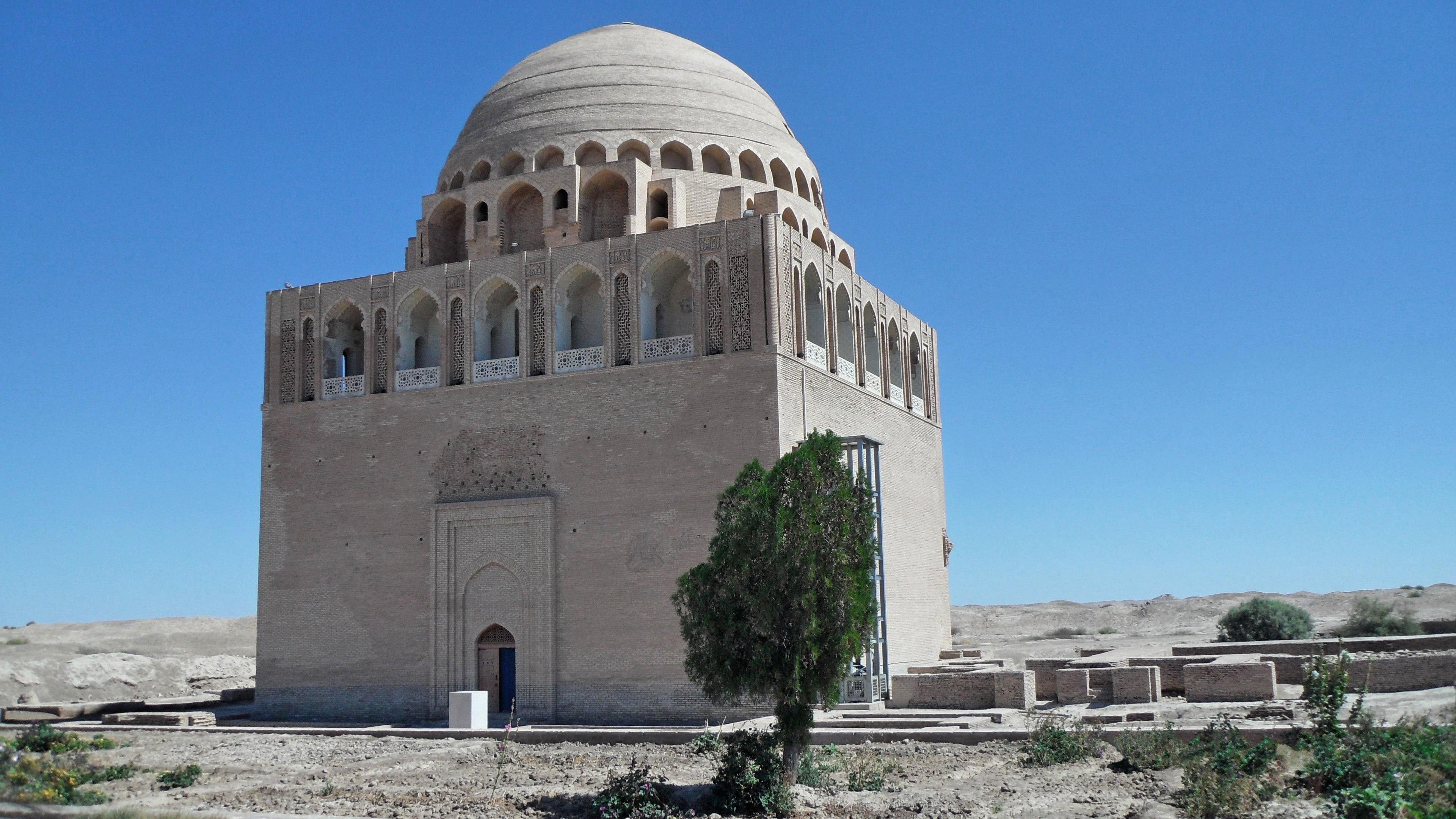 MervTurkmenistan Sultan Sanjar Mausoleum